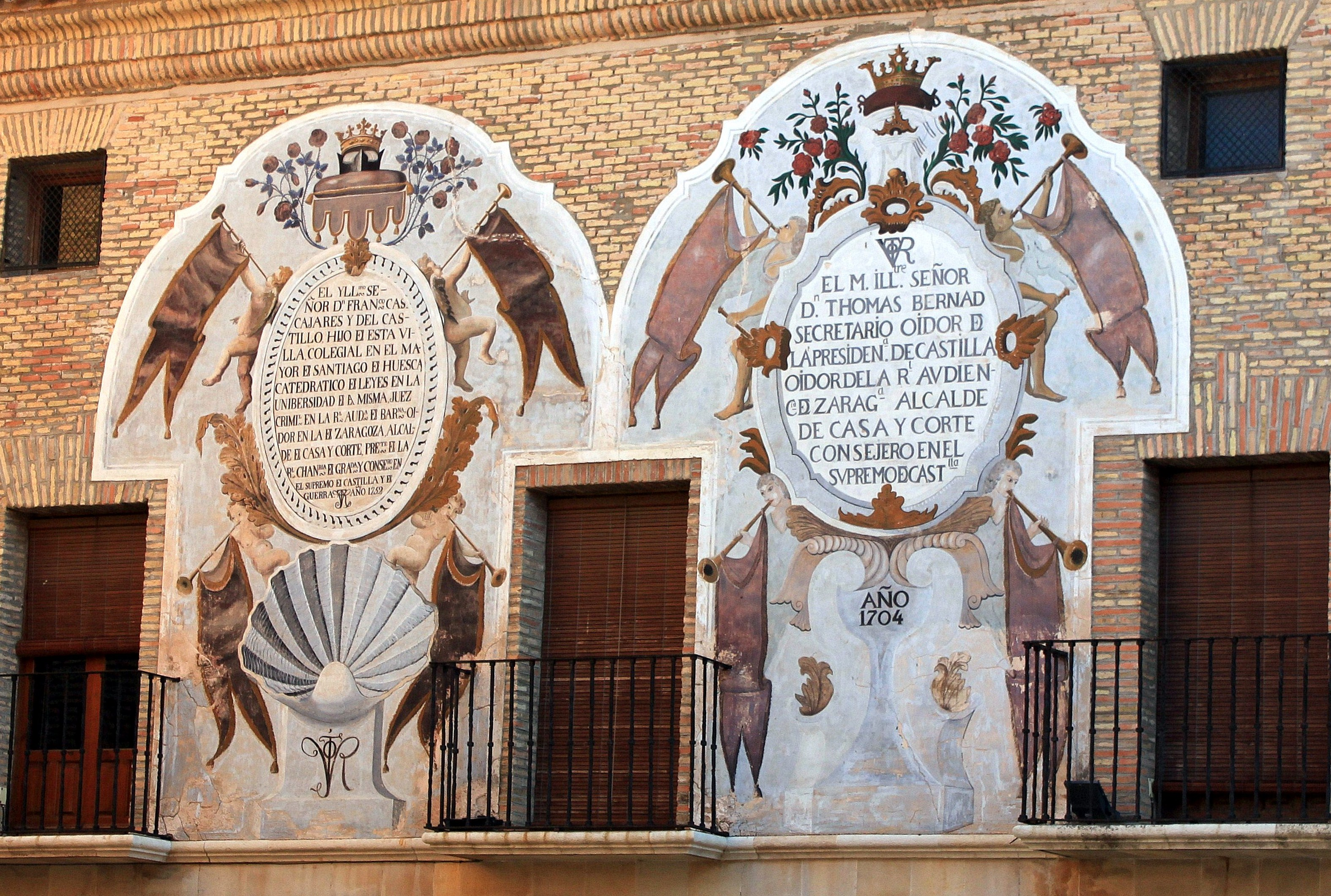 Ayuntamiento de Calanda (Teruel): frescos de la fachada lateral.